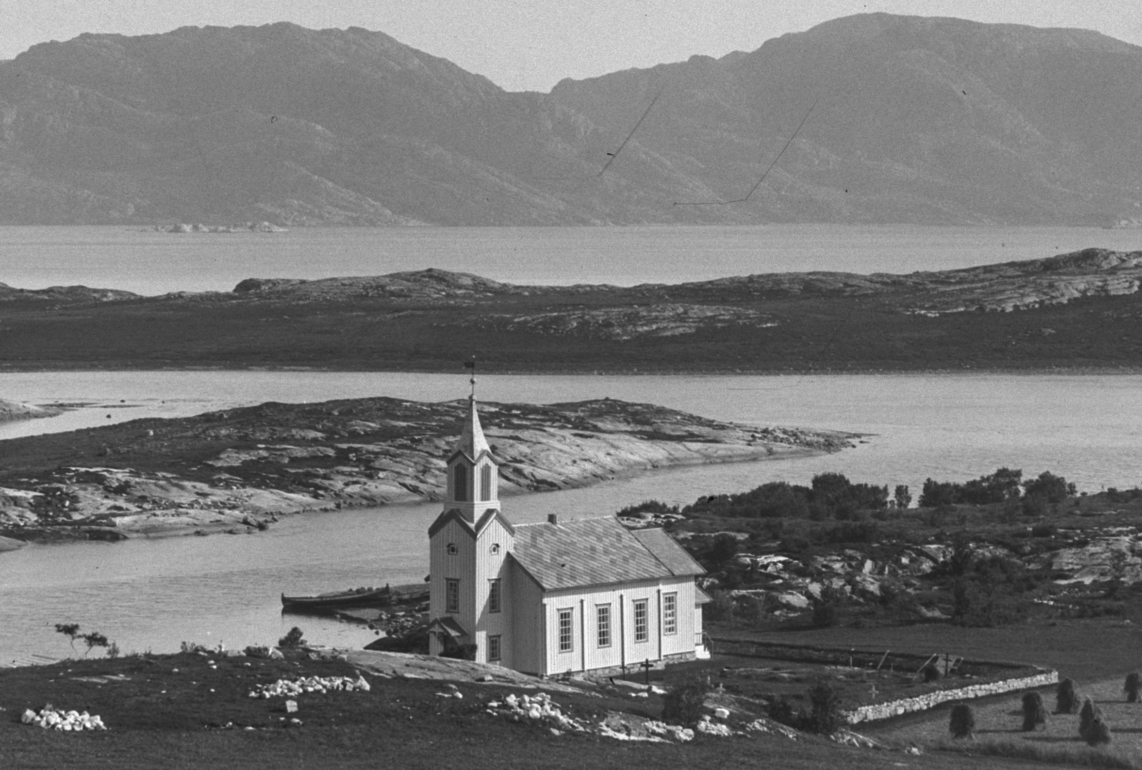 Løvøy kirke, Flatanger. Foto: Johan Lebrecht Horneman/NTNU UB. ID: UBT-HO-043_01.